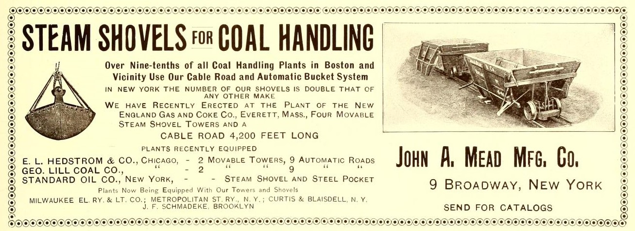 John A. Mead Mfg., 9 Broadway, New York.